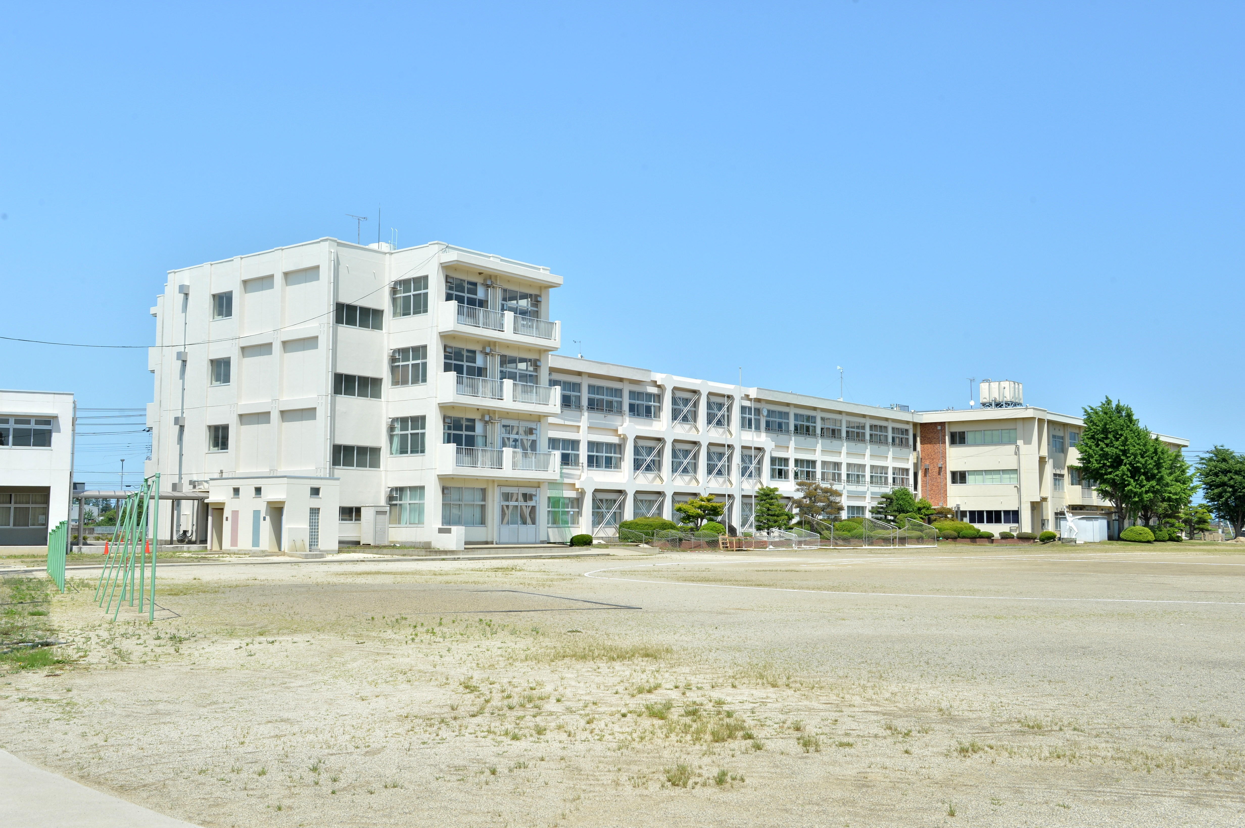 ひたちなか市馬渡に所在する、ひたちなか市立勝田第三中学校の校舎（グラウンド側）